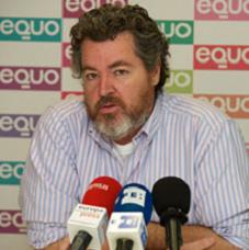 Líder de EQUO y exdirector de Greenpeace en España